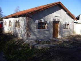 Le Lavoir, Aillant-sur-Milleron, Loiret, Centre, France